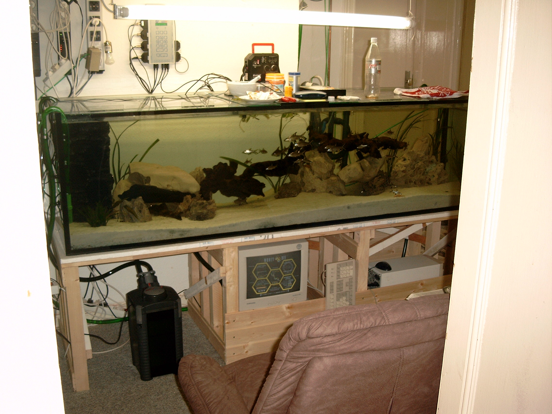 Aquarium 800 Liter mit vom Computer gesteuertem Teilwasserwechsel (Computer makes water changes)